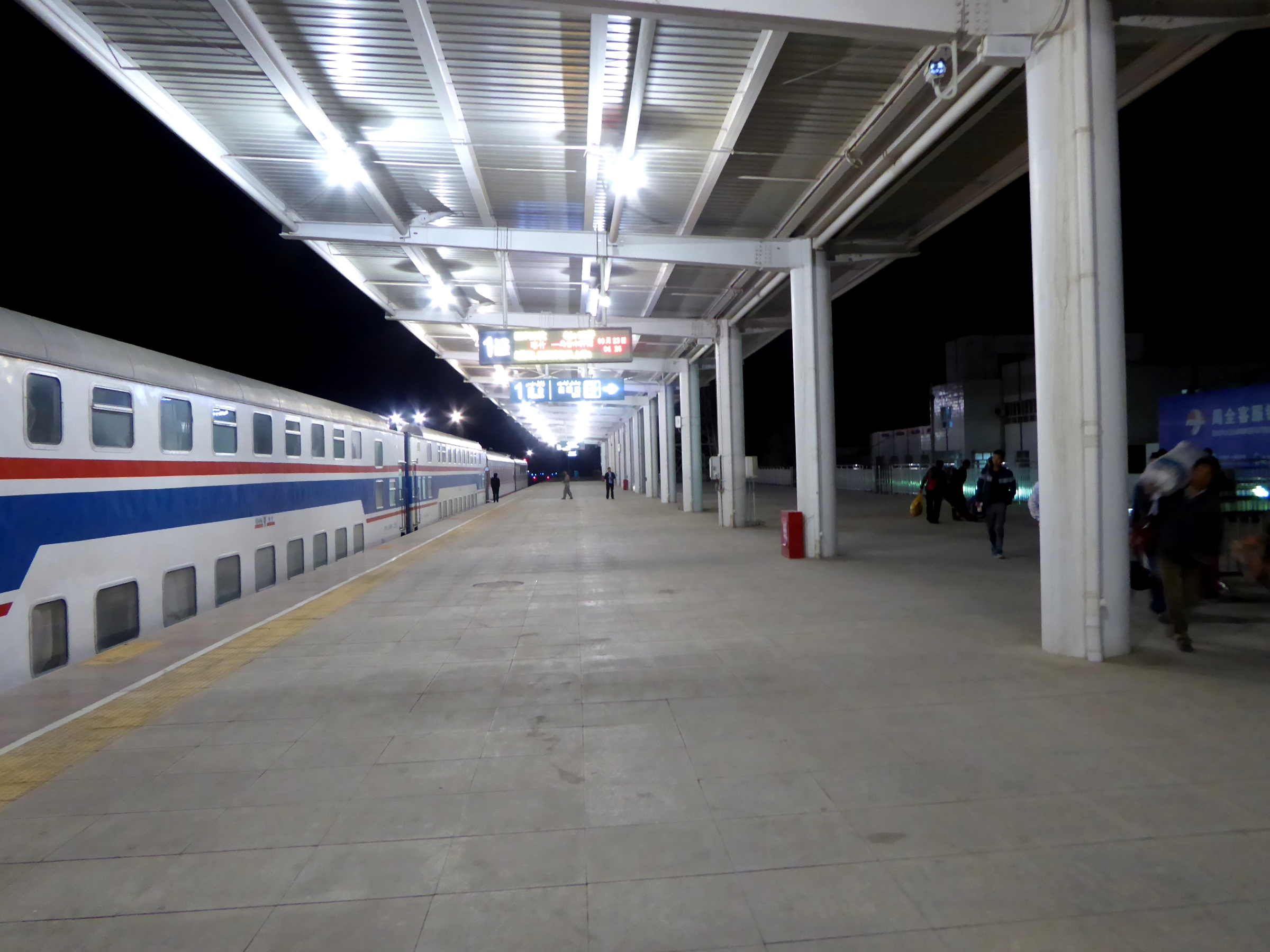 Railway Station Kuqa Xinjiang China 新疆 库车 火车站